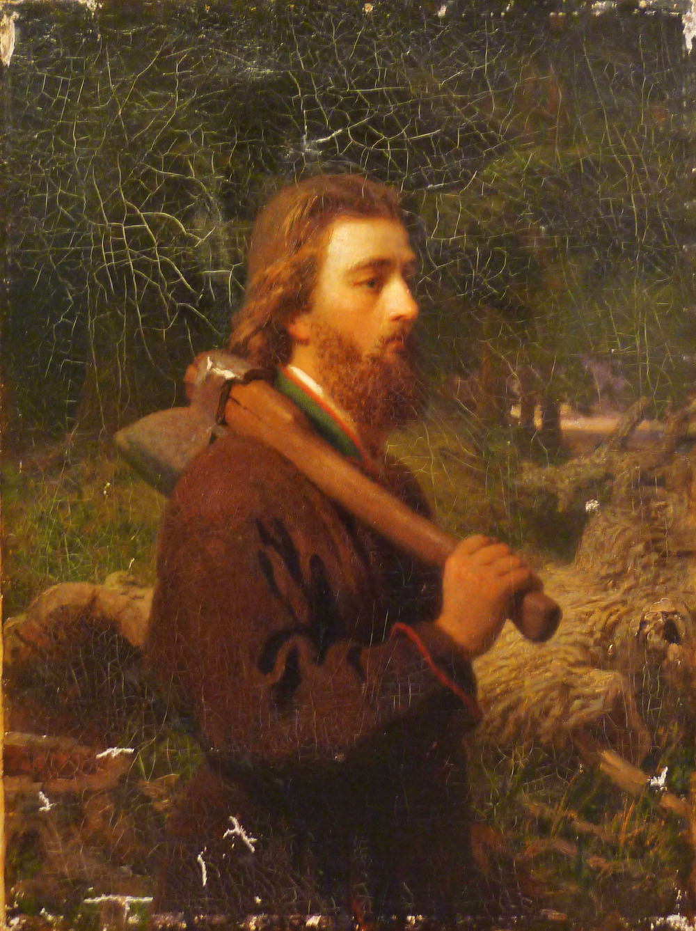 "Hiiu saare talupoeg kirvega" ehk "Villem Tamme portree"